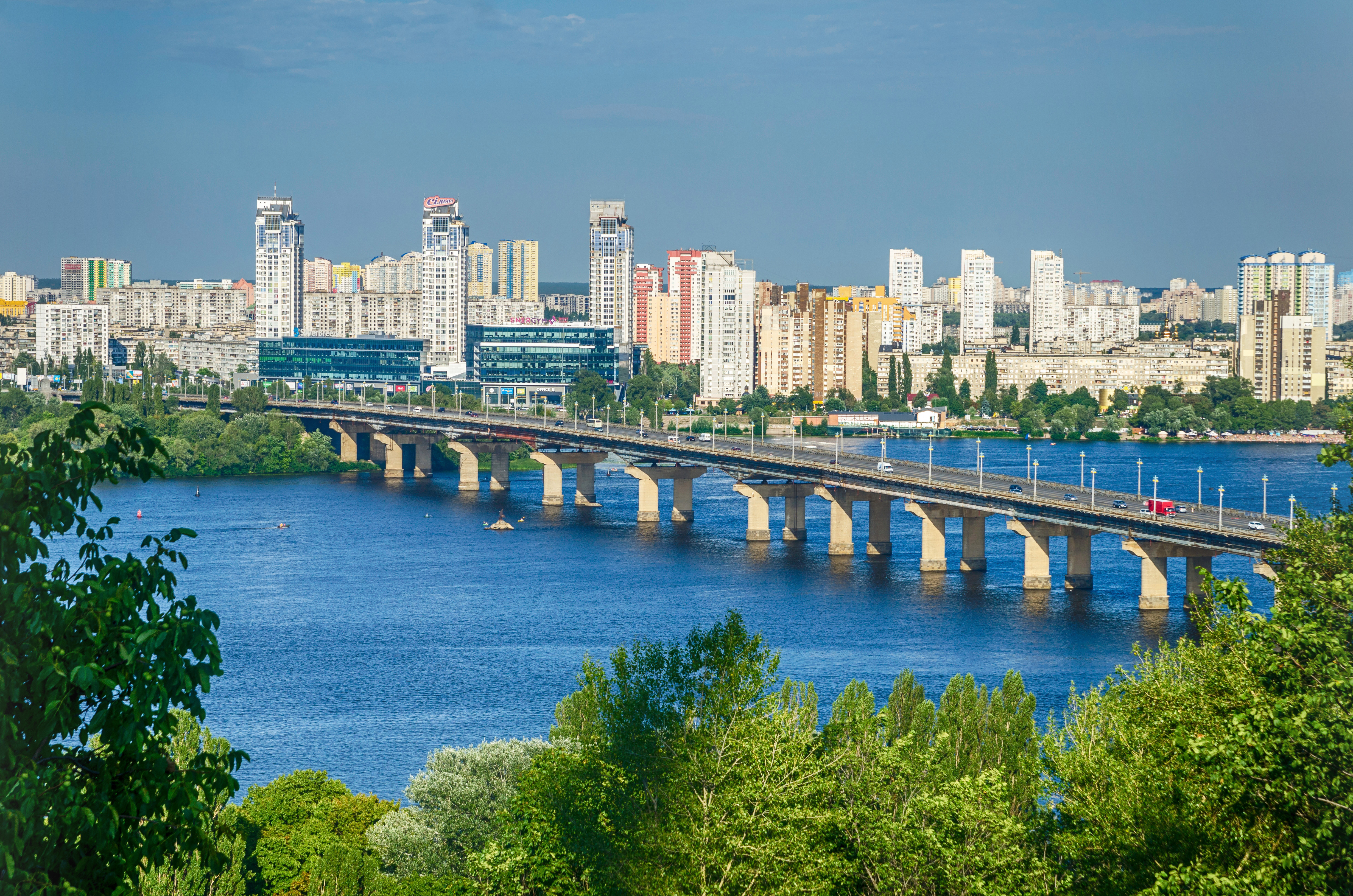 Міст ім. Є. О. Патона, Київ, Набережна Дніпра